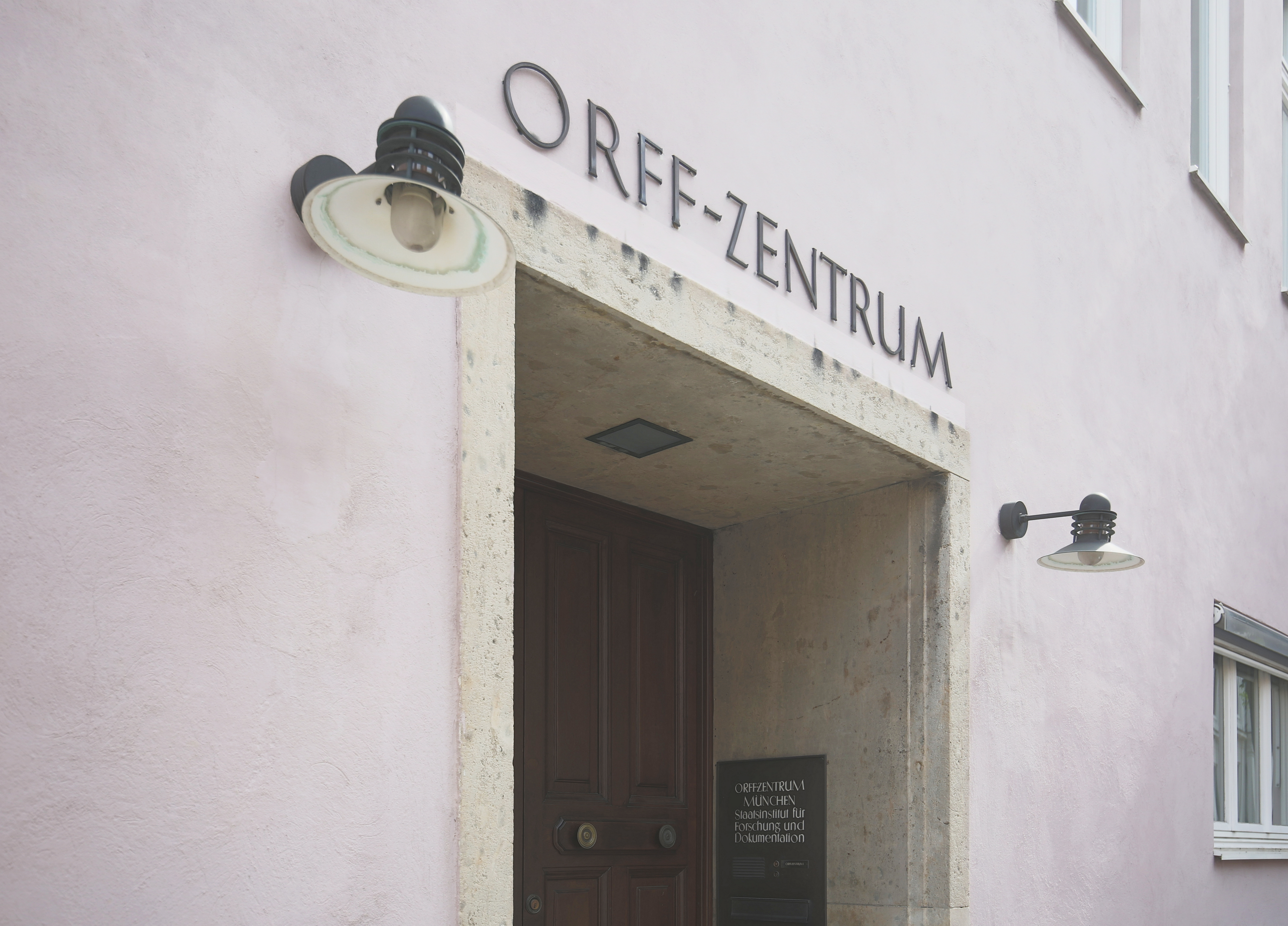 Orff-Zentrum München, Kaulbachstraße 16. Auf dem Grundstück stand ein Vorgängerbau, in dem von 1936-1944 die von Carl Orff 1924 mitgegründete Günther-Schule ihren Sitz hatte. Der heutige Bau entstand 1951 als Privathaus, seit 1967 war dort die Hochschule für Fernsehen und Film München untergebracht, seit 1990 ist das Orff-Zentrum dort untergebracht.